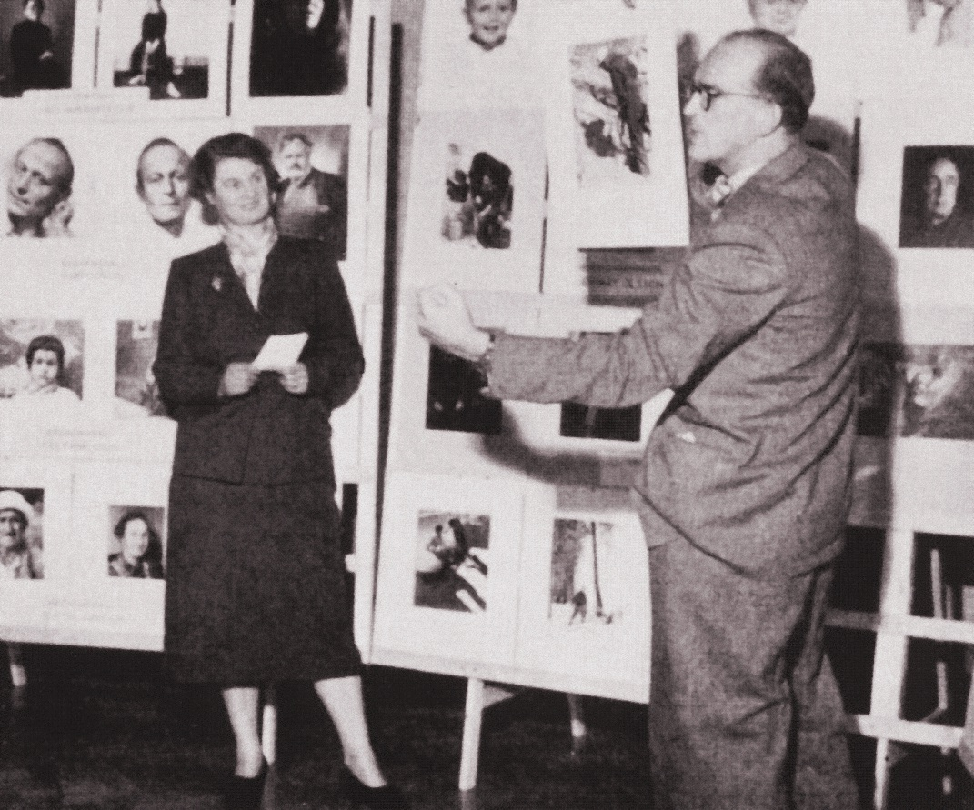 Lennart af Petersens och Kerstin Bernhard 1951